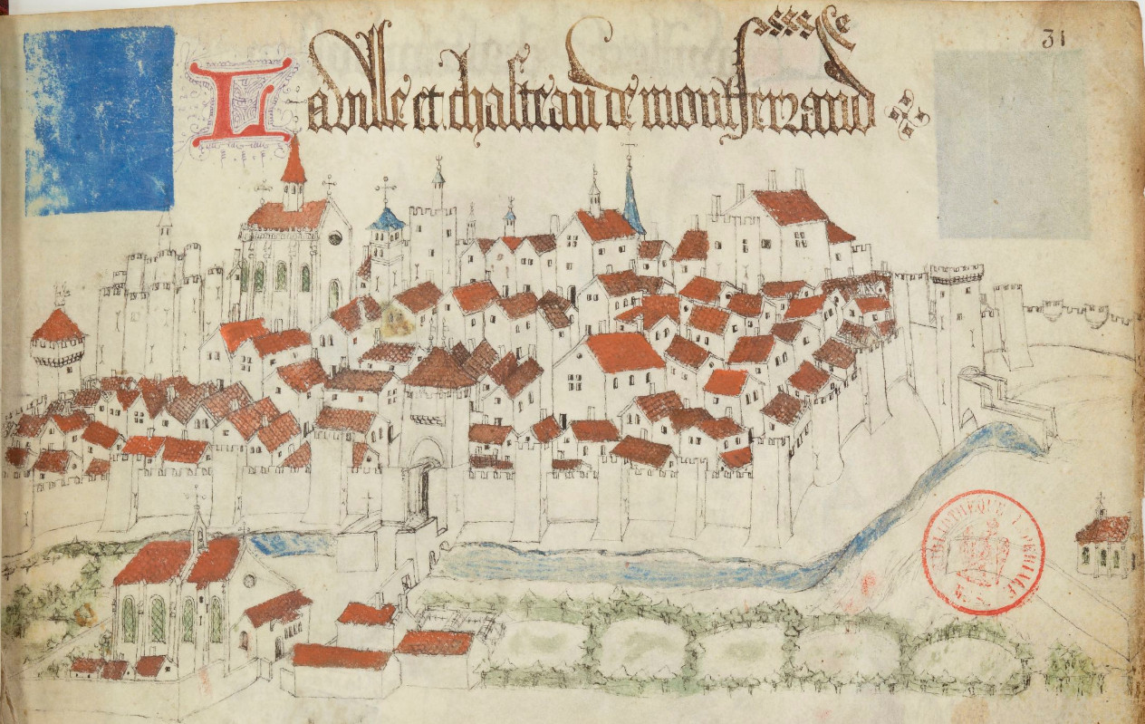 Montferrand in Armorial d'Auvergne, pages présentant des châteaux, villes et blasons.